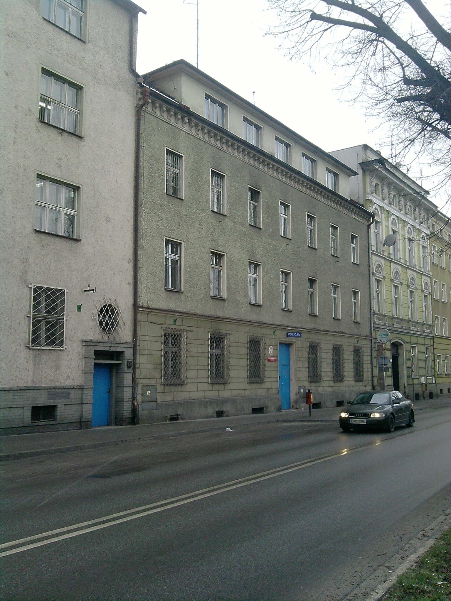 Budynek przy placu Wolności 8